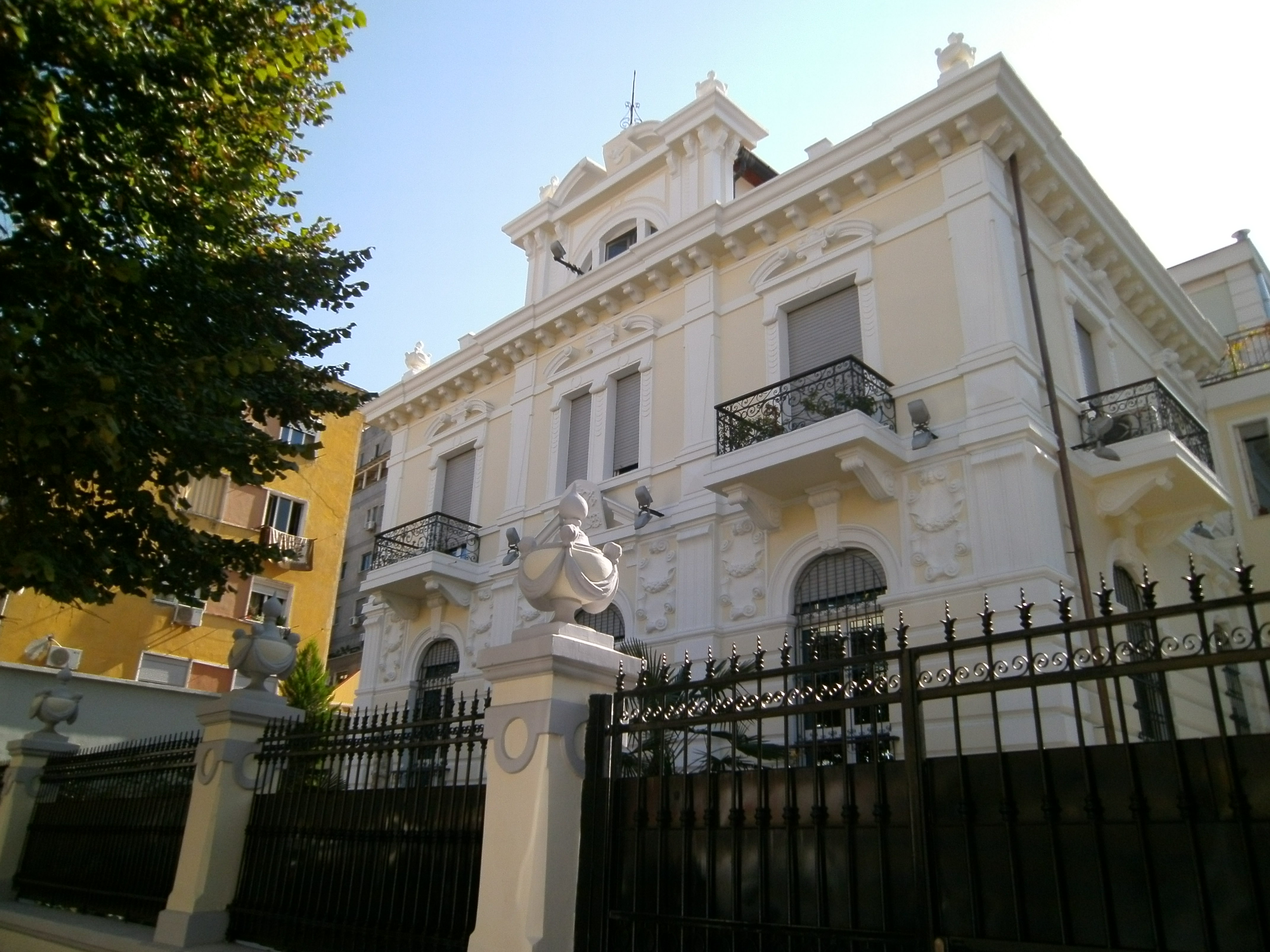 Ambasada e Vatikanit, pamje nga rruga buze saj.